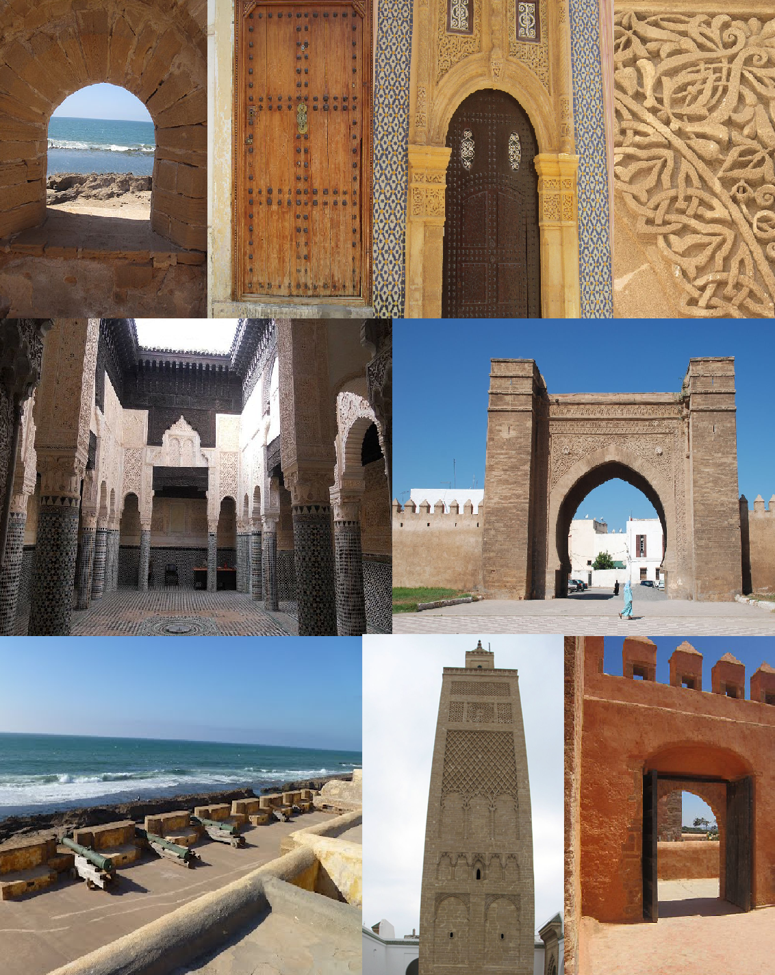 Médina de la ville de Salé au Maroc avec ses monuments